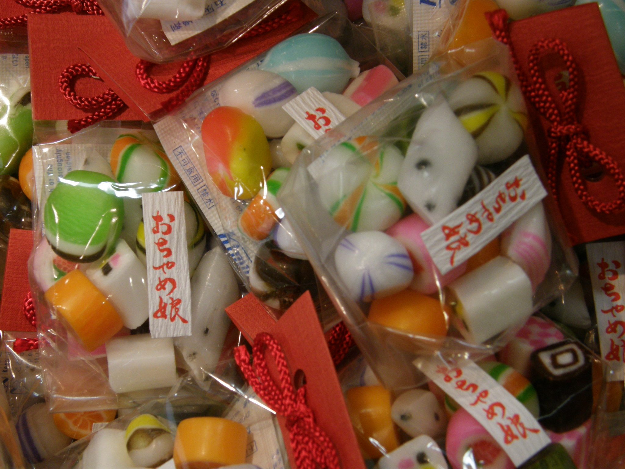 Candy Ochame-Musume おちゃめ娘